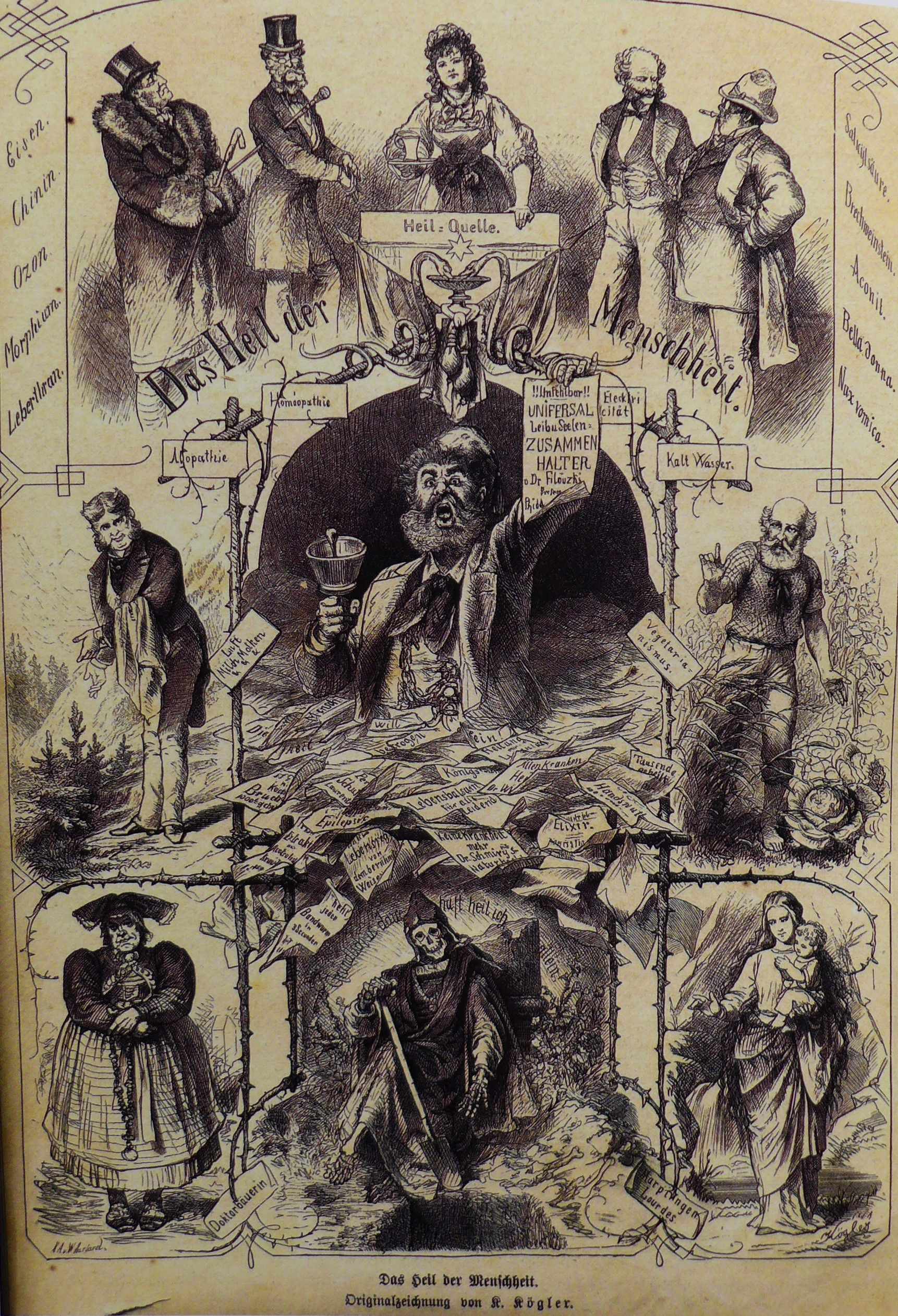 Karikatur von K. Kögler aus der Zeitschrift "Gartenlaube" mit dem Titel "Das Heil der Menschheit", Satirische Darstellung von betrügerischen Heilsversprechern; Unten rechts werden die Marienerscheinungen von Marpingen und Lourdes als negative Beispiele angeführt. (Stiftung Marpinger Kulturbesitz)